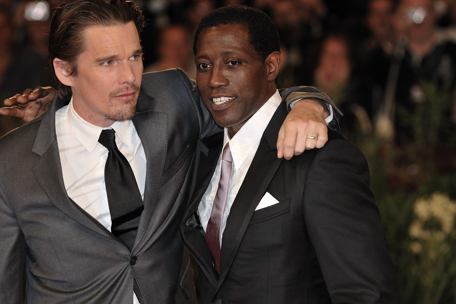 66ème Festival du Cinéma de Venise (Mostra), 8ème jour (07/09/2009) Tapis rouge avec Ethan Hawke et Wesley Snipes et le réalisateur Antoine Fuqua pour le film : Brooklyn's finest